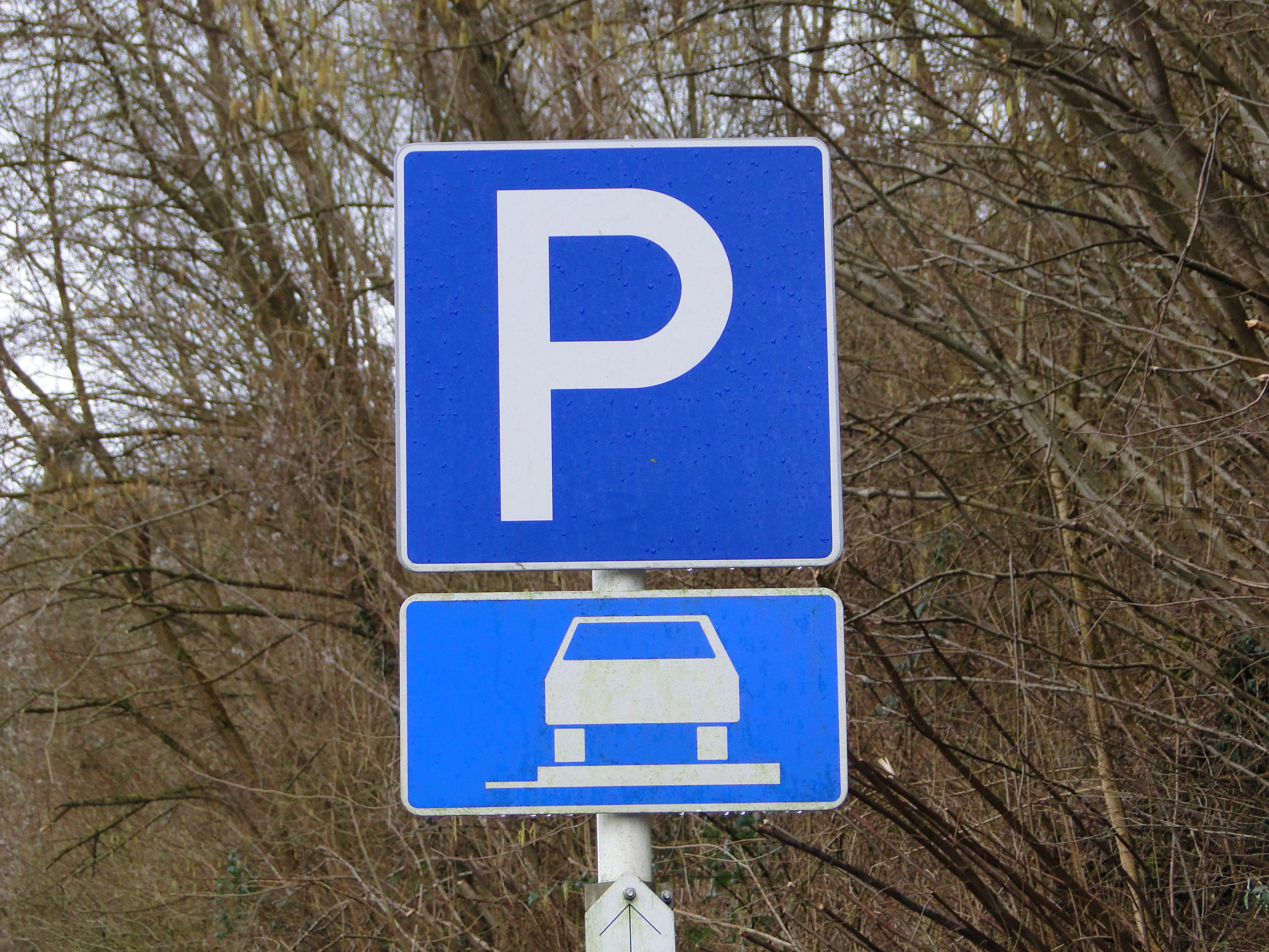 Verkéiersschëld F,15 aus dem lëtzebuerger Code de la Route: F,15 "Erlaabt fir um Trëttoir ze stationéieren".